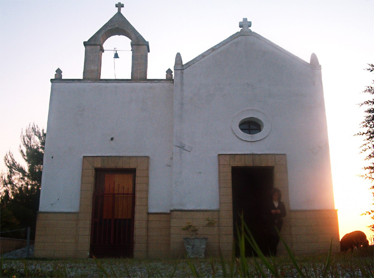 "La Cona", Chiesa della Madonna del Latte di Salice Salentino (LE)